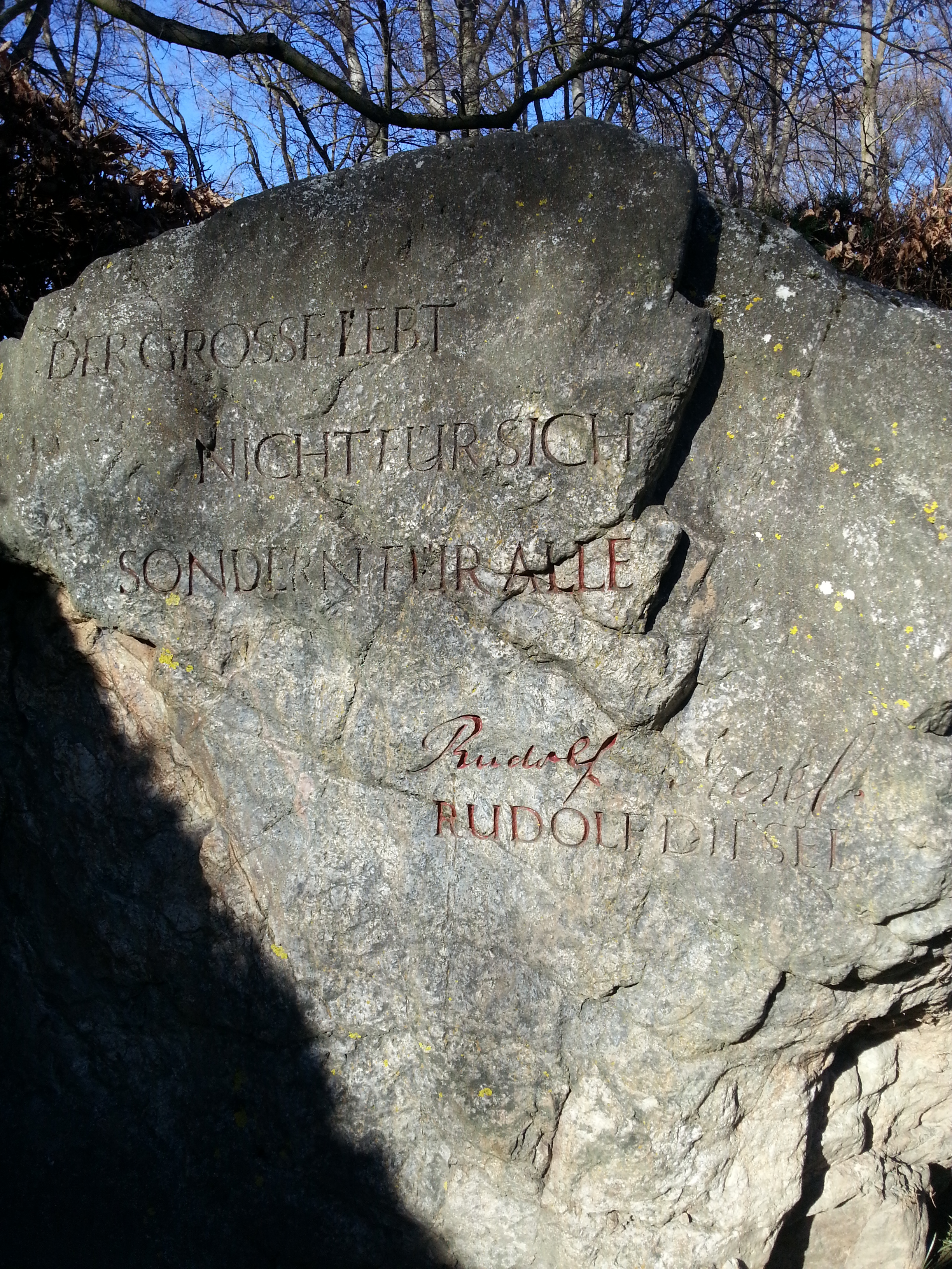 Japanischer Steingarten im Wittelsbacher Park Augsburg, Bayern